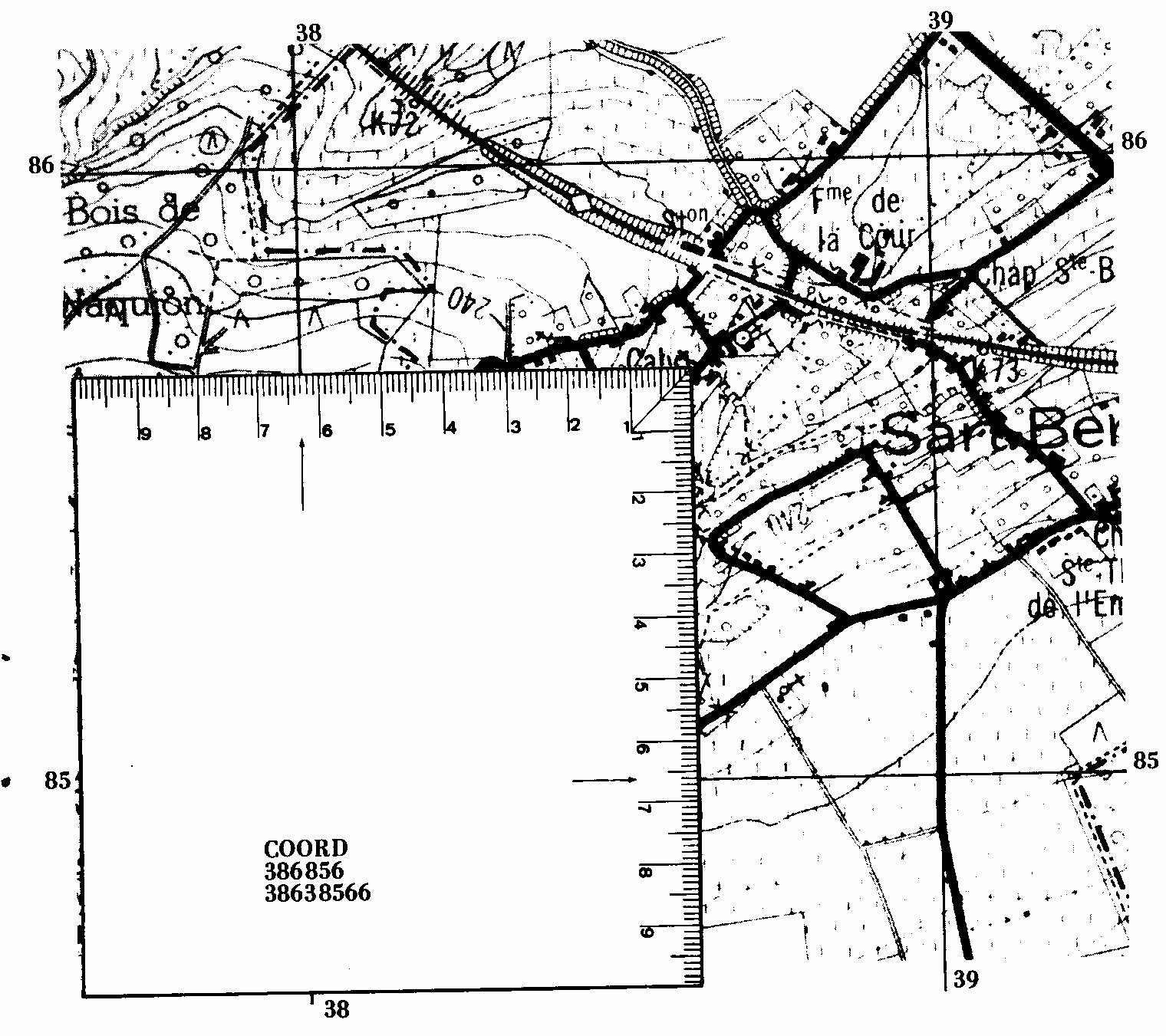 UTM-Koordinatesystem: Mat engem Réimer kann een eng Prezisioun vun 10 m op enger Kaart vun 1:20.000 erreechen. An dësem Fall sinn d'Koordinaten 32UFK38638566. Well ee jo seelen Distanzen iwwer 100 km mécht, ginn d'Koordinaten dacks ofgekierzt an nëmmen als 38638566 (Prezisioun 10 m) oder 386856 (Prezisioun 100 m)duergestallt. .